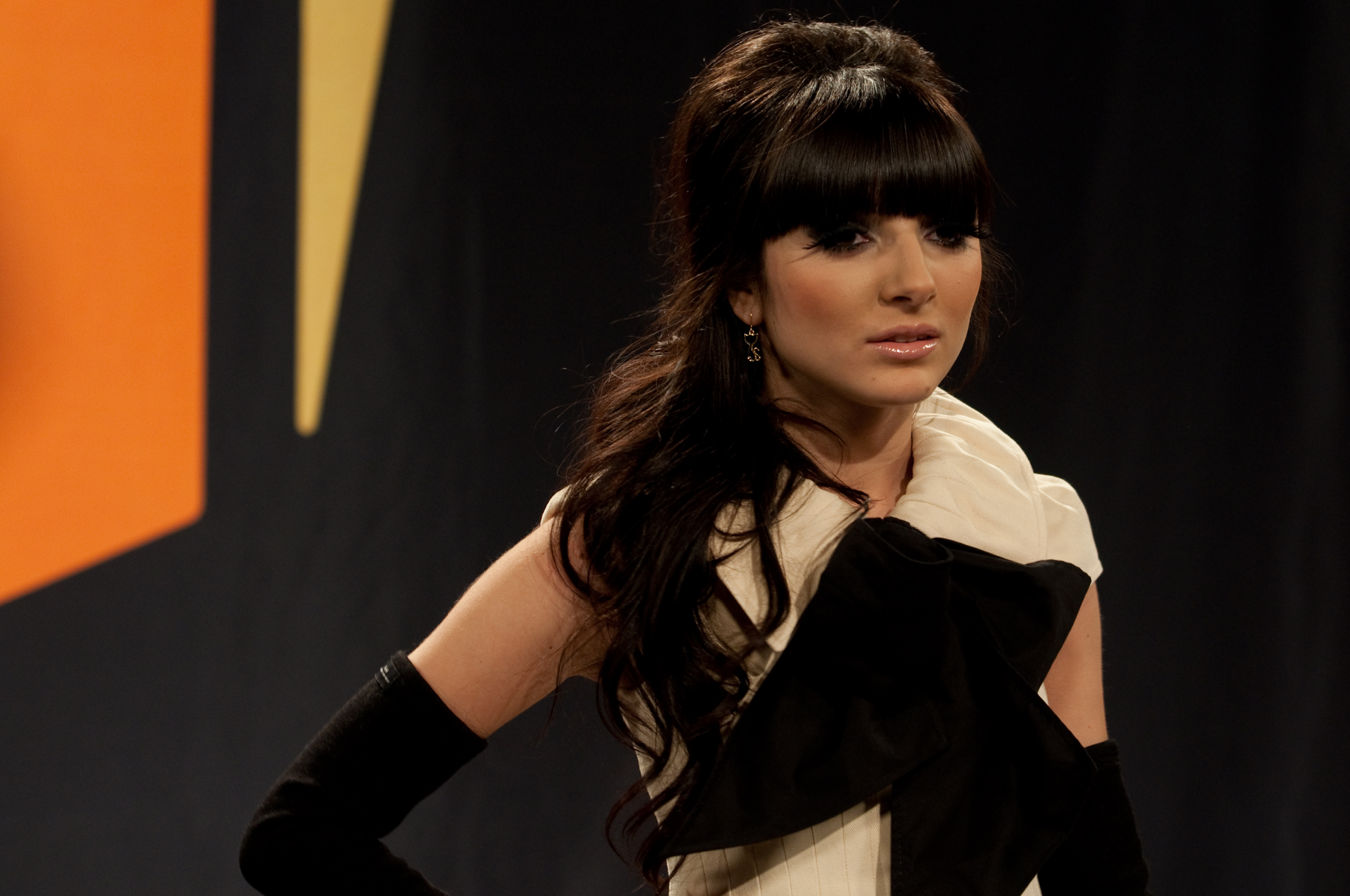 Sibel 2009 at a press conference for Melodifestivalen 2010